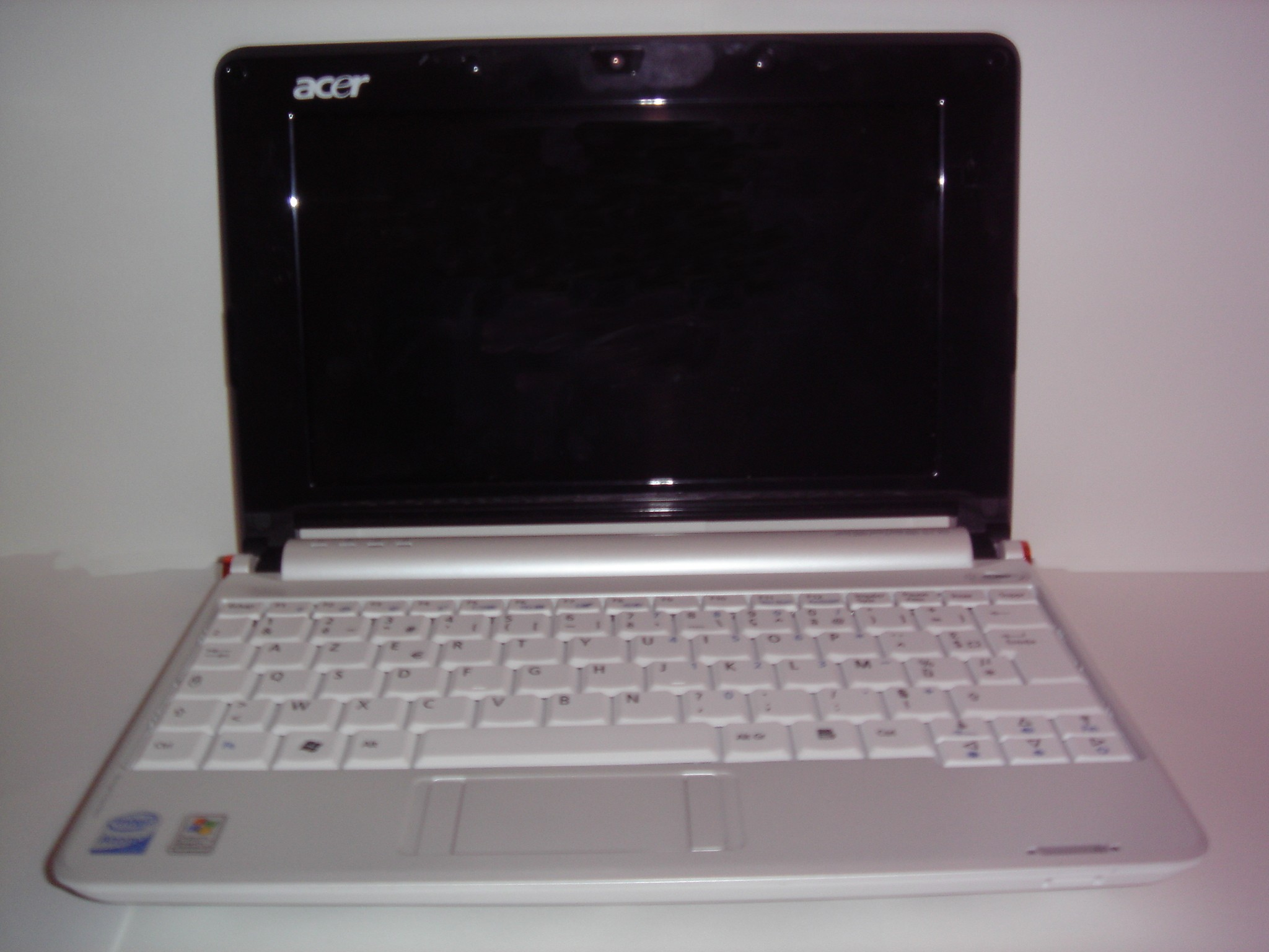 Face d'un acer aspire one.